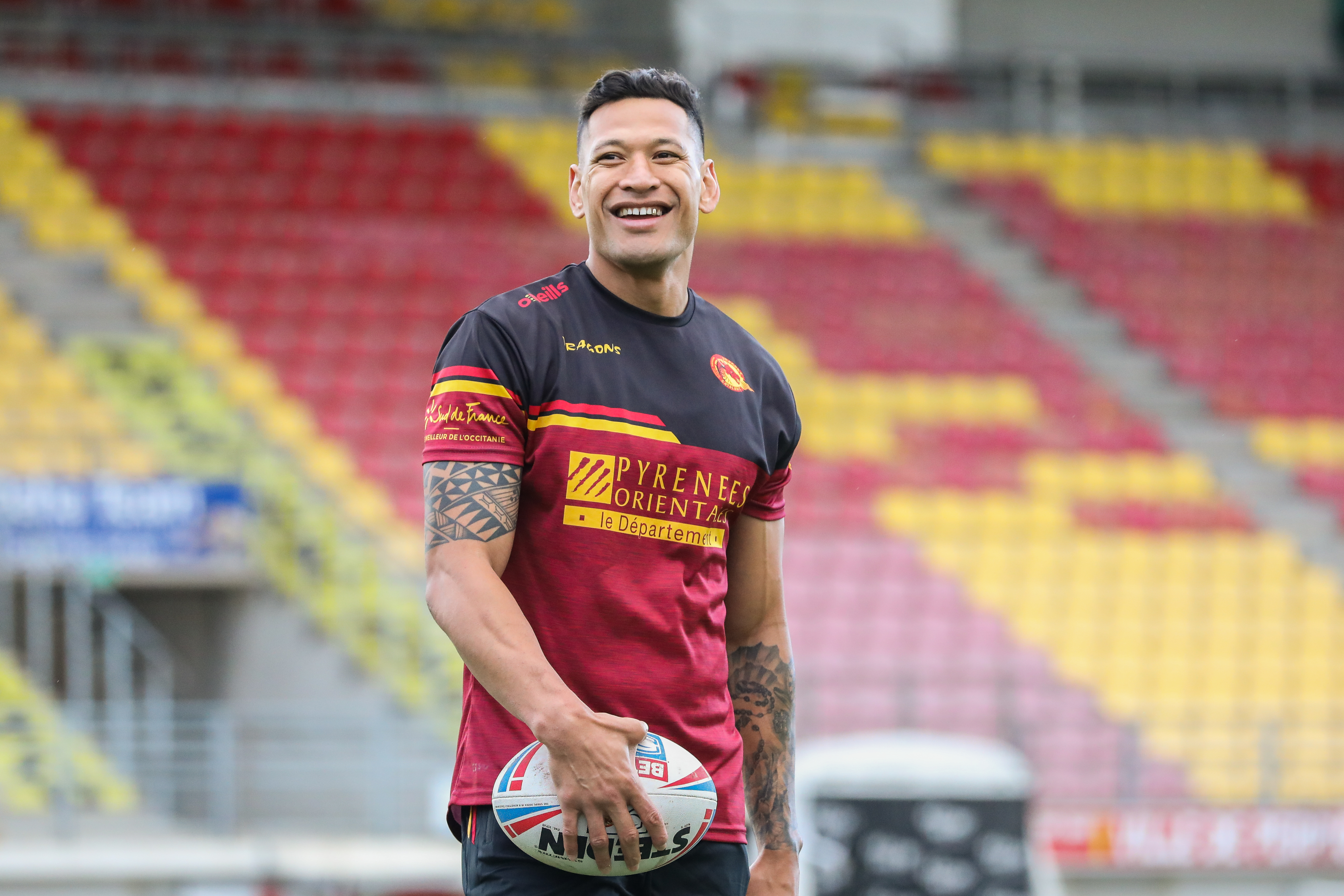 Israel Folau sous le maillot des Dragons Catalans en 2020